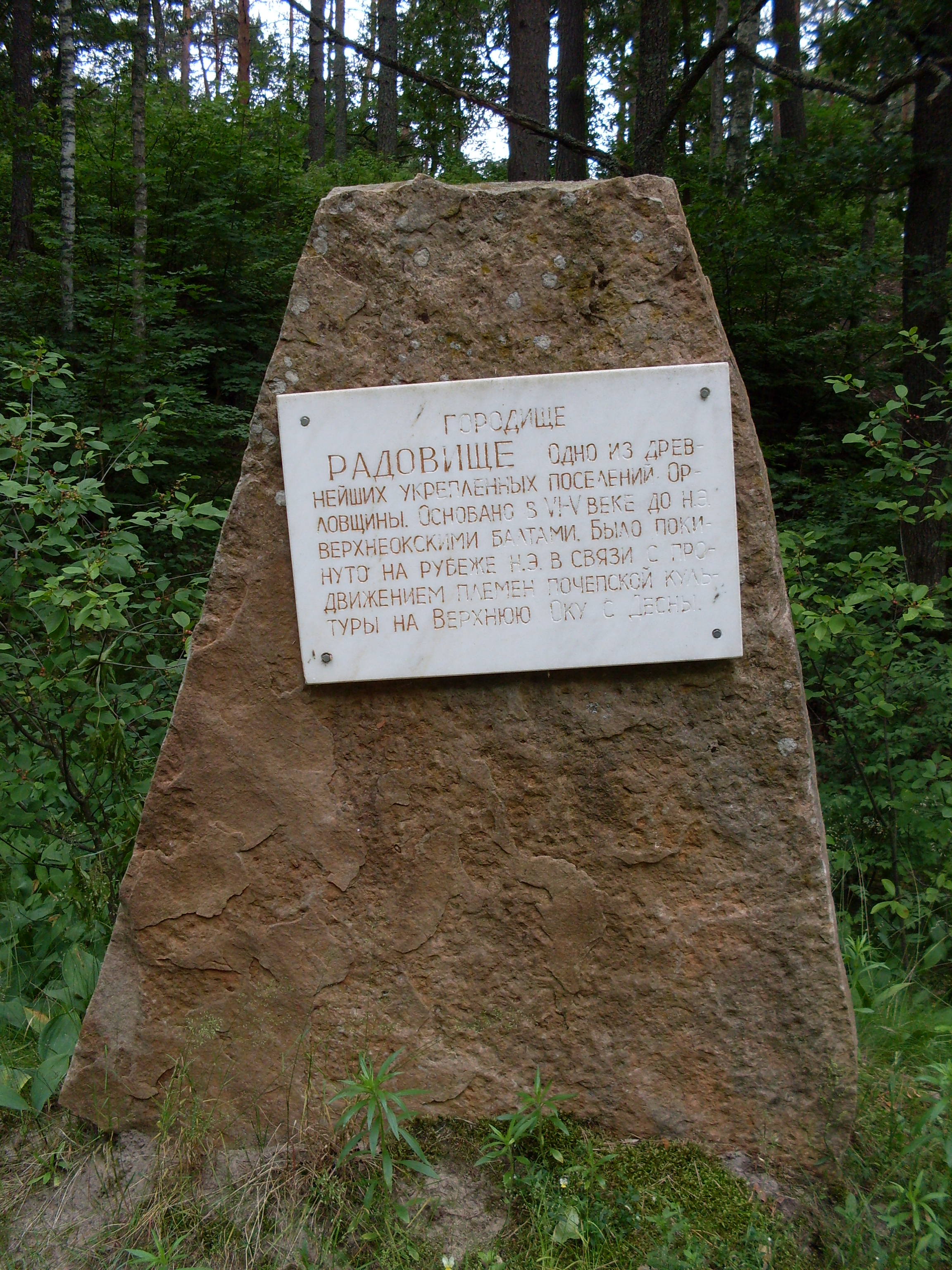 Городище Радовище: урочище "Кудеярова гора", слева от дороги Радовище-Жудре, Родовище, Хотынецкий район, Орловская область